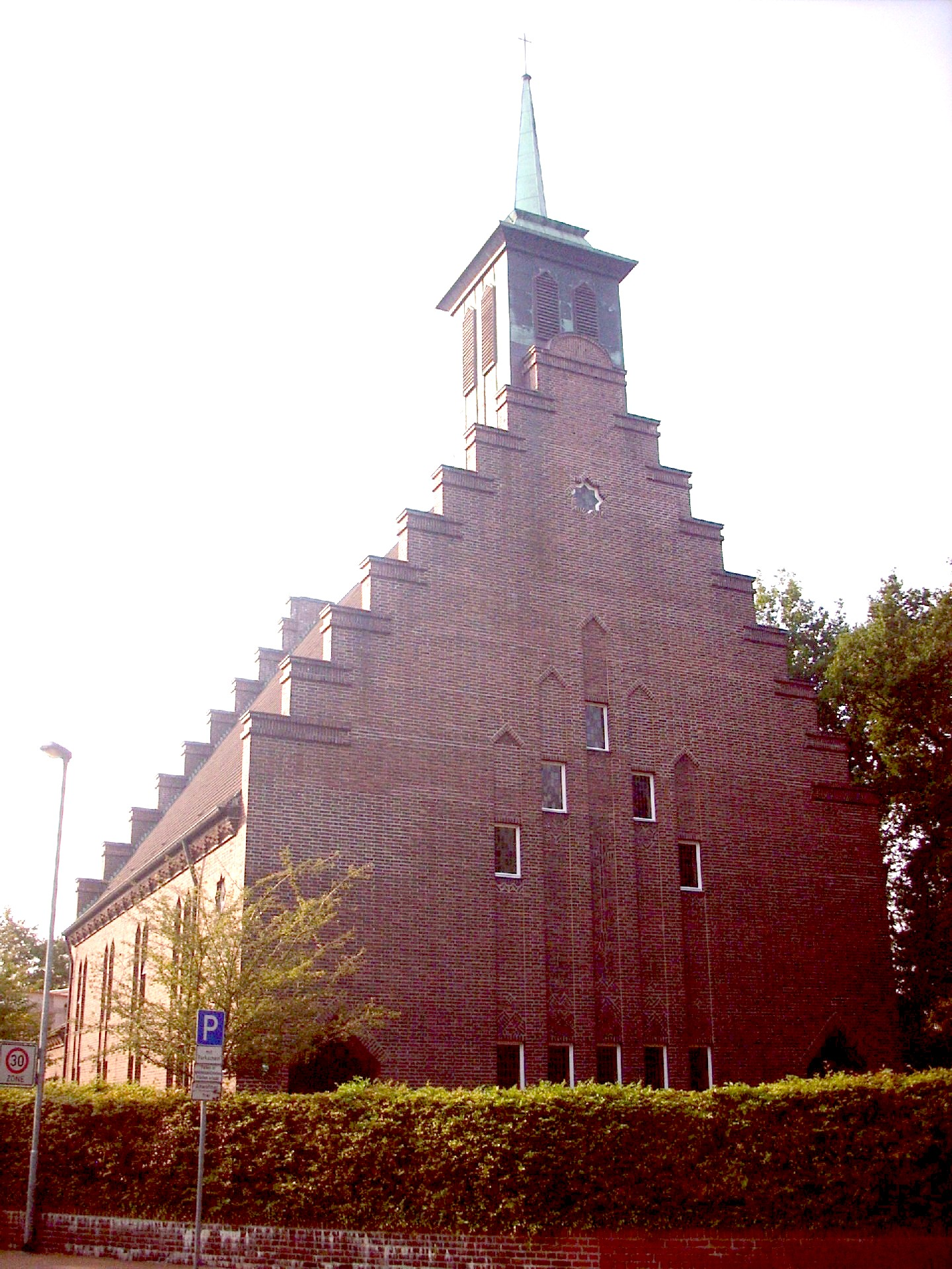 Ev.-luth. Kreuzkirche, Nordhorn